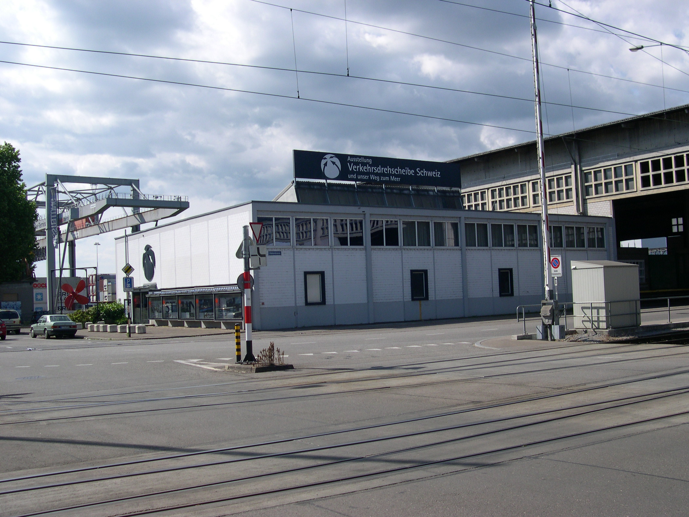 Museum/Ausstellungsgebäude «Verkehrsdrehscheibe Schweiz» im Rheinhafen Kleinhüningen in Basel.